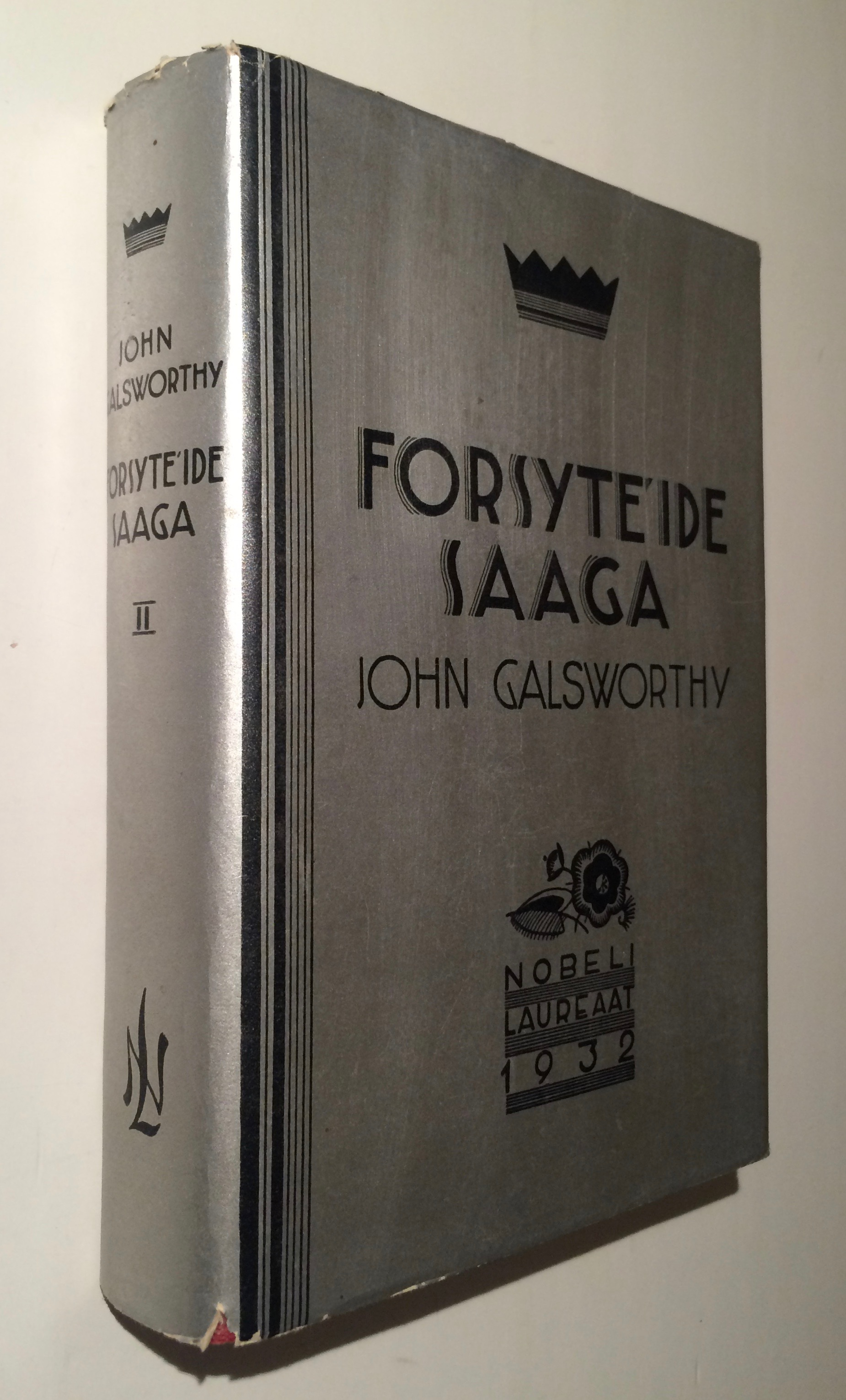 Natalie Šišajeva poolt kujundatud ümbrispaber